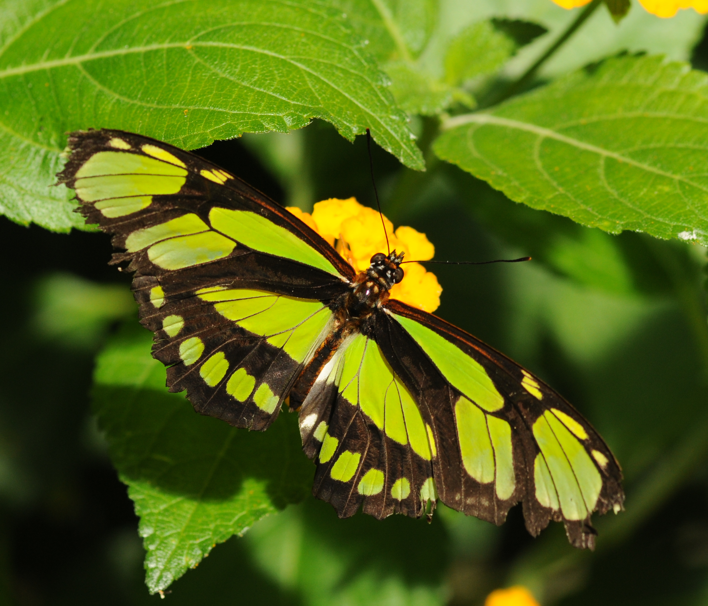 Lépidoptère